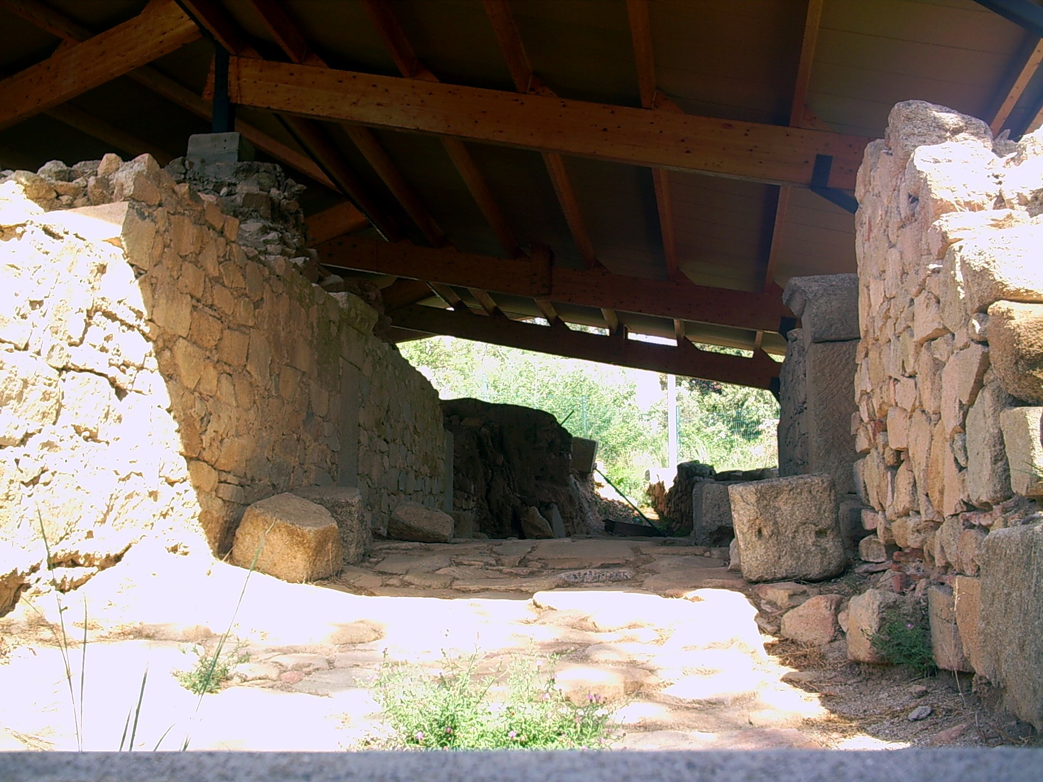 Jaciment de Can Modolell, (segle IV aC). Cabrera de Mar, el Maresme, (Catalunya).